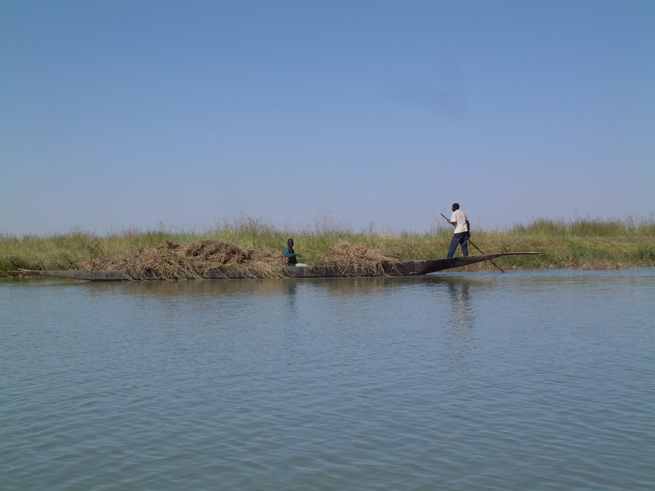 Auteur: Taguelmoust Moisson en pinasse sur les rives du Niger au Mali. GFDL Taguelmoust janvier 2003